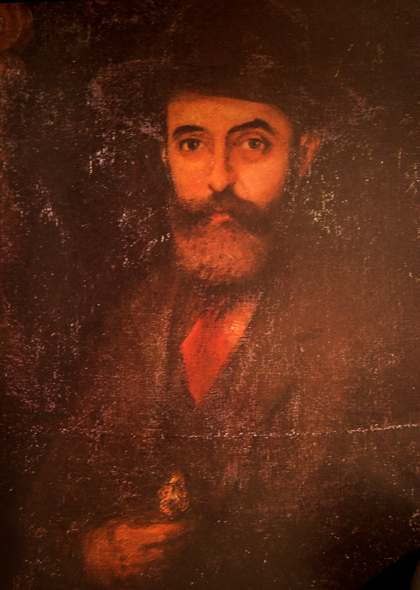 Retrat de Gaspar Homar, ebenista modernista (1870-1953)